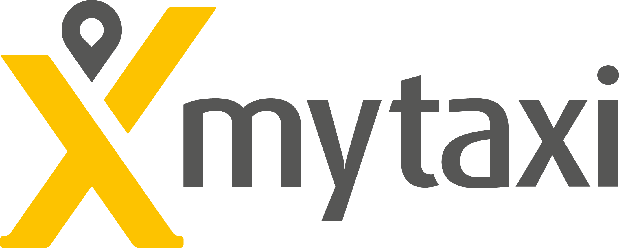 logo mytaxi